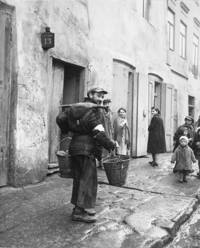 Polen, Ghetto Lublin, Wasserträger ADN-ZB/Archiv Polen unter der Okkupation des faschistischen Deutschlands 1939-1945 Im Ghetto von Lublin. Es gibt hier keine Wasserleitungen in den Häusern, nur Zapfstellen auf der Straße. Daher gehören die Wasserträger zur alltäglichen Erscheinung. (Aufnahme: Dezember 1940) Information added by Wikimedia users.